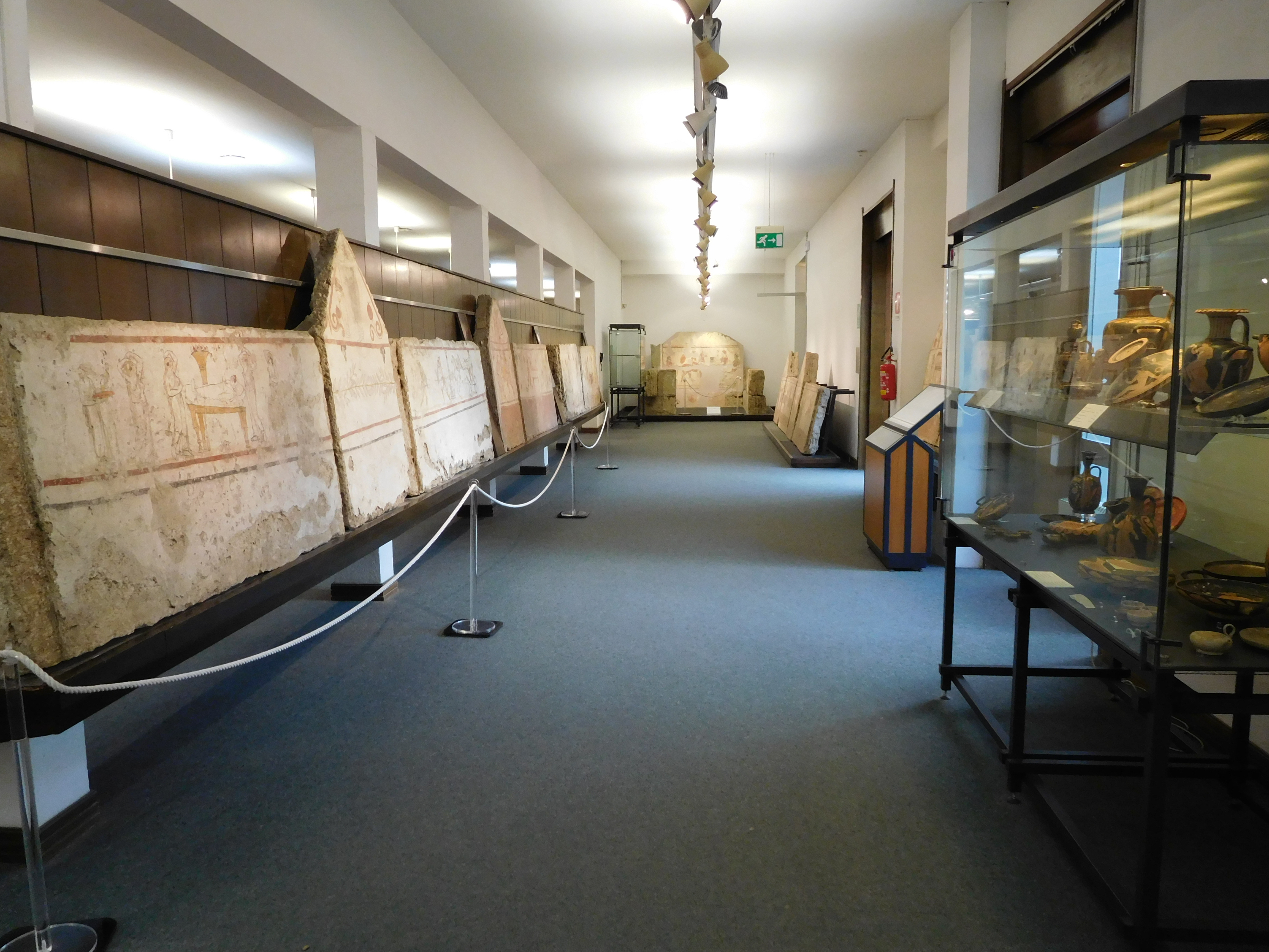 Museo archeologico nazionale, Paestum This is a photo of a monument which is part of cultural heritage of Italy.